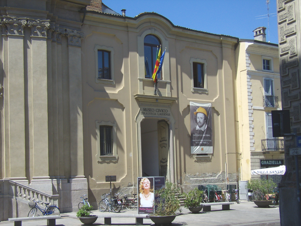 Lodi, la facciata del palazzo San Filippo.